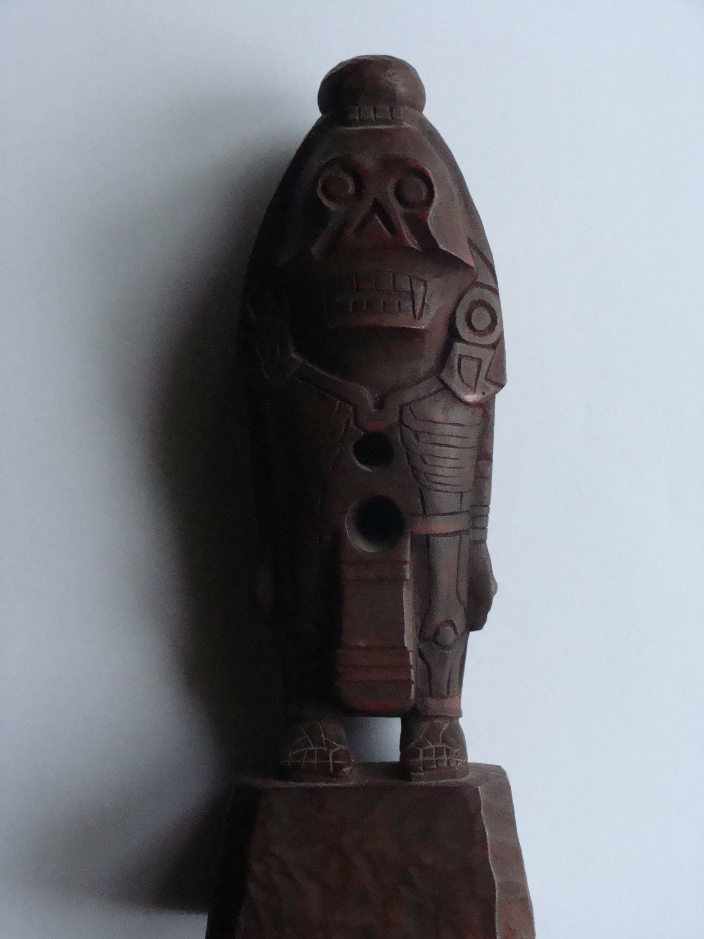 Xolotl rzeźba boga Azteków dłuta R. Zwierzynieckiego.